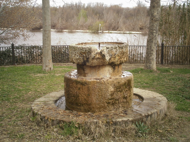 El Bocal de Fontellas - Navarra (Spain)